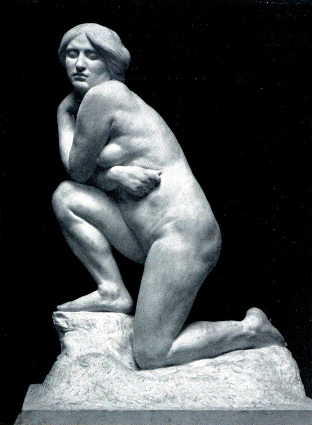 Eva